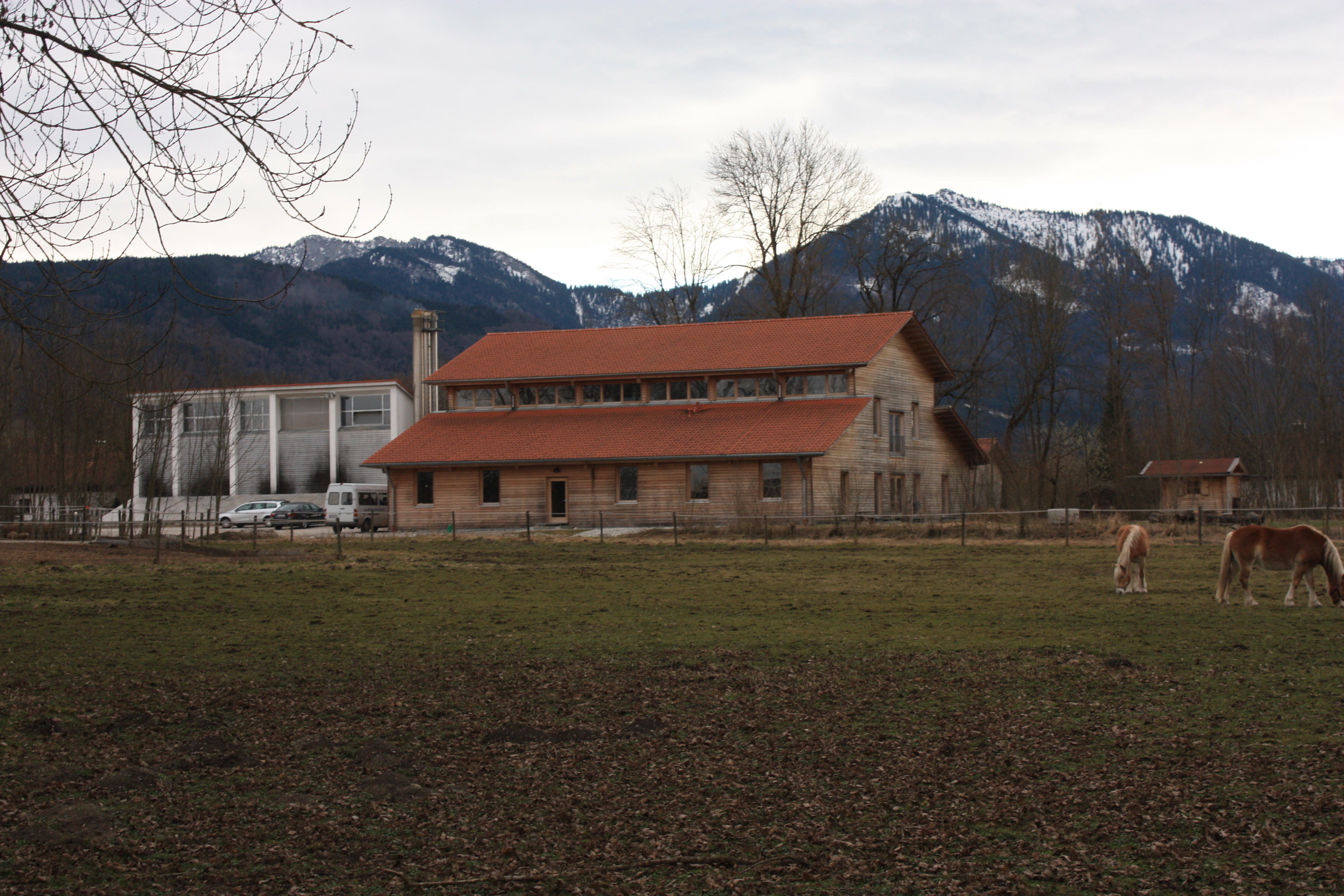 Energiepavillion und Energiezentrale, Kloster Benediktbeuern, Zentrum für Umwelt und Kultur Benediktbeuern